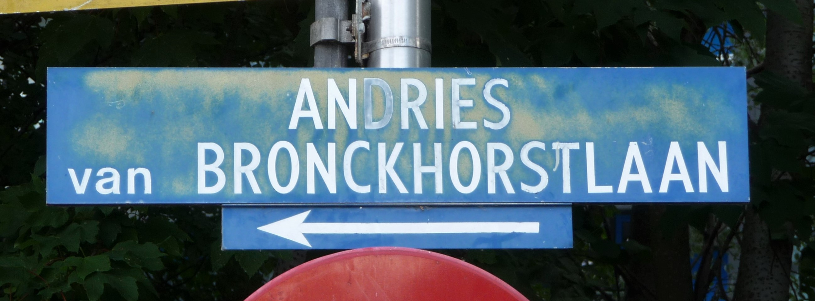 Andries van Bronckhorstlaan, Spijkenisse, straatnaambord. Andries van Bronckhorst (1478-1547/8) was o.a. Raad van Holland en eigenaar van gronden op het eiland Putten. Nadat zowel in 1530 als in 1532 de dijken op Putten braken, de polders overstroomden en vele bewoners met de veestapel verdronken, werd hij benoemd tot dijkgraaf. Hij zorgde ervoor dat bijna alle polders van Putten herdijkt werden (uitgezonderd het dorp Putten, dat ongeveer lag waar nu de Wolvenpolder en Nieuwe Uitlsag van Putten zijn). Bron: Spijkenisse en zijn oude kerk : monument : ontmoetingsplaats in een groeiend delta-dorp / J. de Baan. - 1980. p. 13